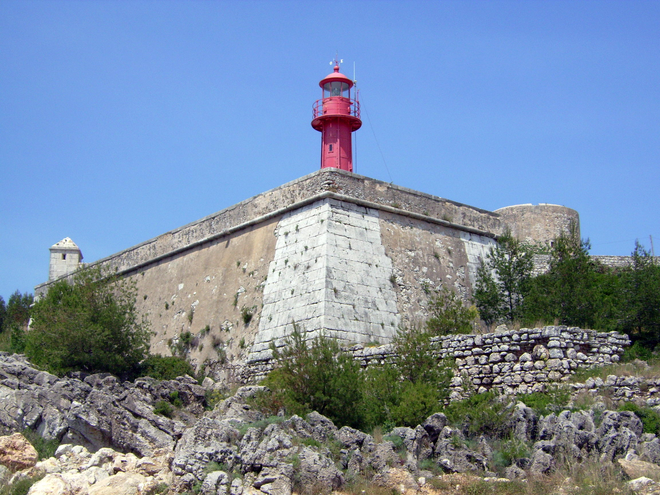 Forte_de_São_Teodósio_da_Ponta_do_Cavalo Local - Sesimbra / Portugal user:sacavem (pt) (usuário:sacavem)